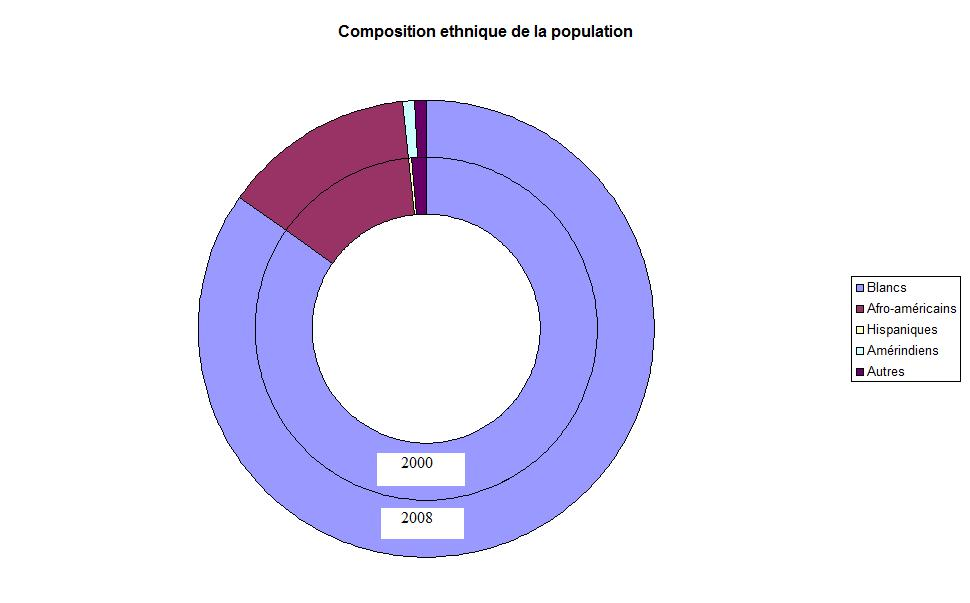 Composition raciale de la population de Dudley (Géorgie, États-Unis) en 2000 et juillet 2008